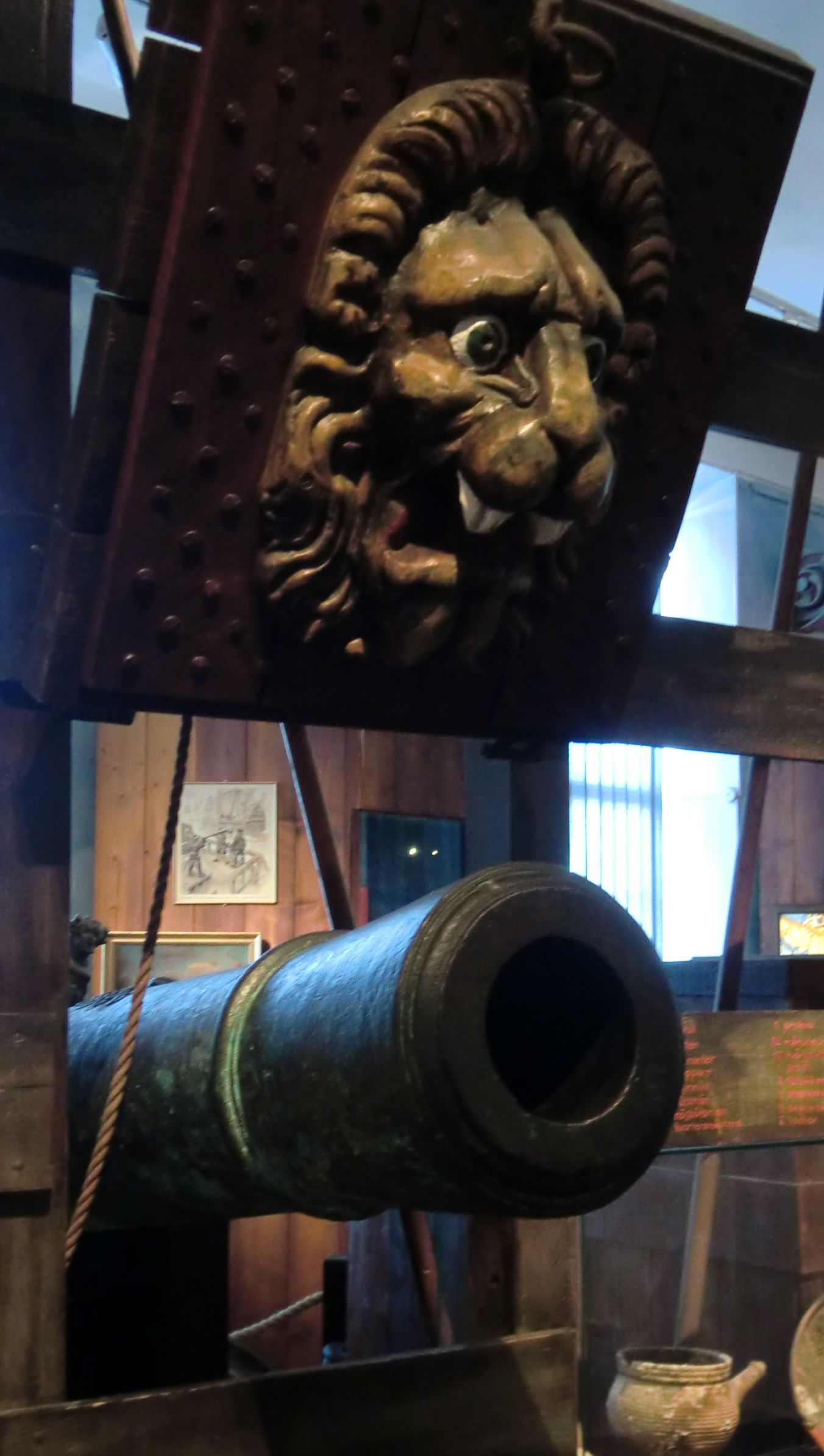 Kanonport med lejonmaskaron och 24-pundig kanon. Några av fynden från det danska krigsfartyget Stora Sofia, som sjönk i Göteborgs skärgård 1645. Sjöfartsmuseet Göteborg.